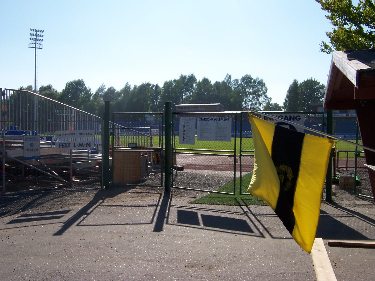 Flagget til Sandefjord Ballklubb ved Storstadion 2006